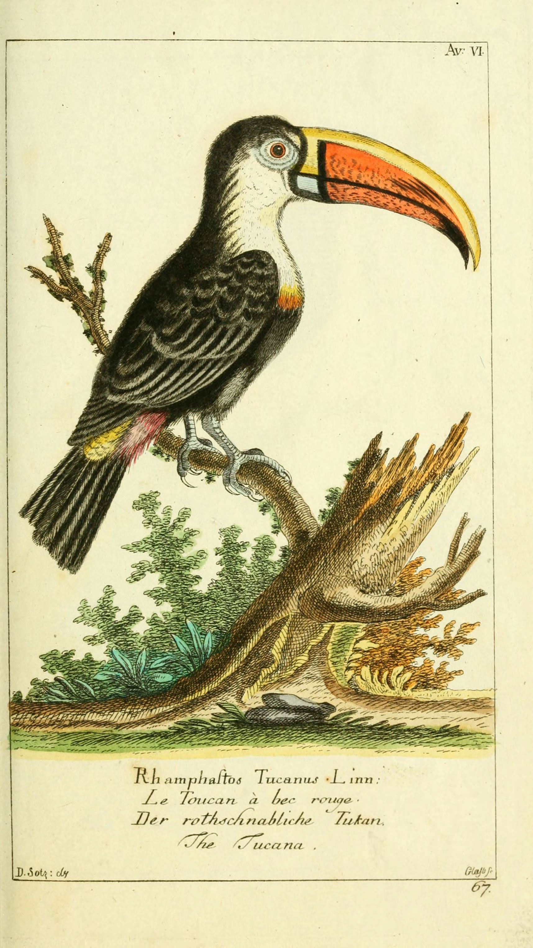 Ivh iiinnlialtoa lucanuJ ■Lmn: J-.e. laue an. a Oc'.~ r.-nqe-- JOer rvtsiacAnaolic/ie. 7iafran. l).Zol\: cW £7